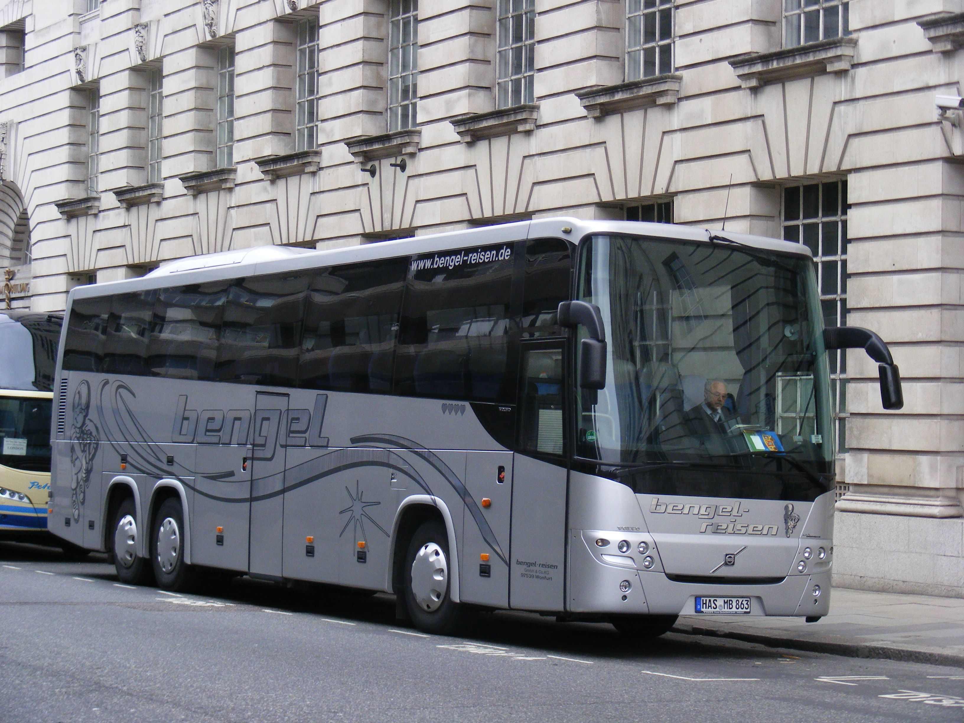 Bengel-Reisen GmbH & Co KG Altachweg 3 97539 Wonfurt , HAS-MB 863 Volvo 9900 12.8m long. Founded 1952 by Hans Bengel, now run by Holger Bengel. Fleet details here